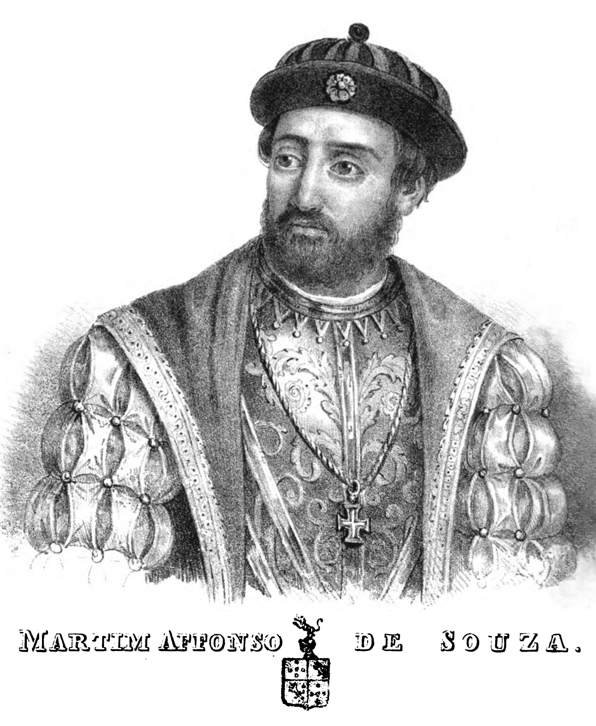 Martim Afonso de Sousa (Vila Viçosa, c.1490/1500 — Lisboa, 21 de julho de 1571) foi um nobre e militar português. Jaz em São Francisco de Lisboa. Como Tomé de Sousa, descendia por linha bastarda do rei Afonso III de Portugal.